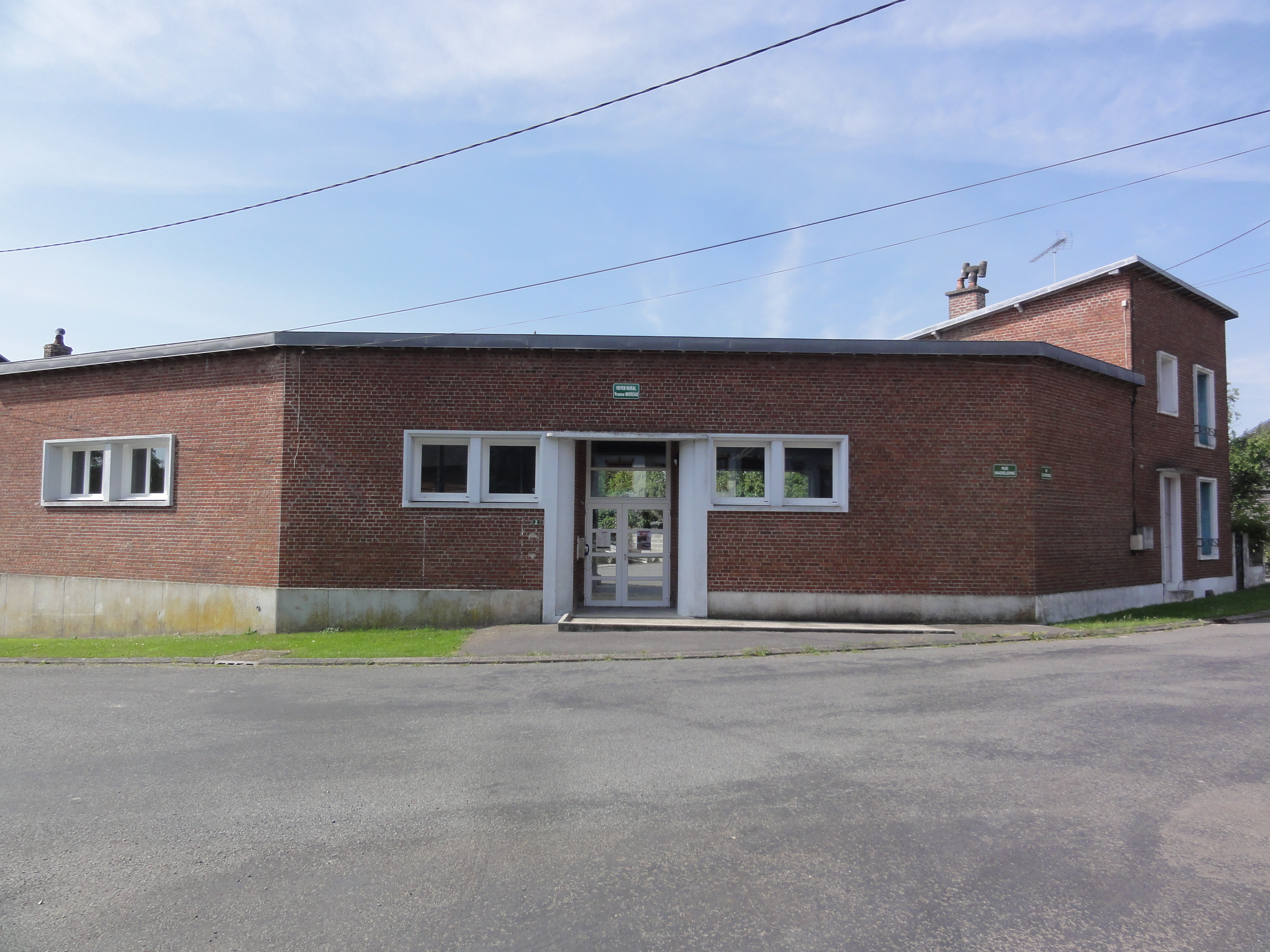 Les Autels (Aisne) foyer rural